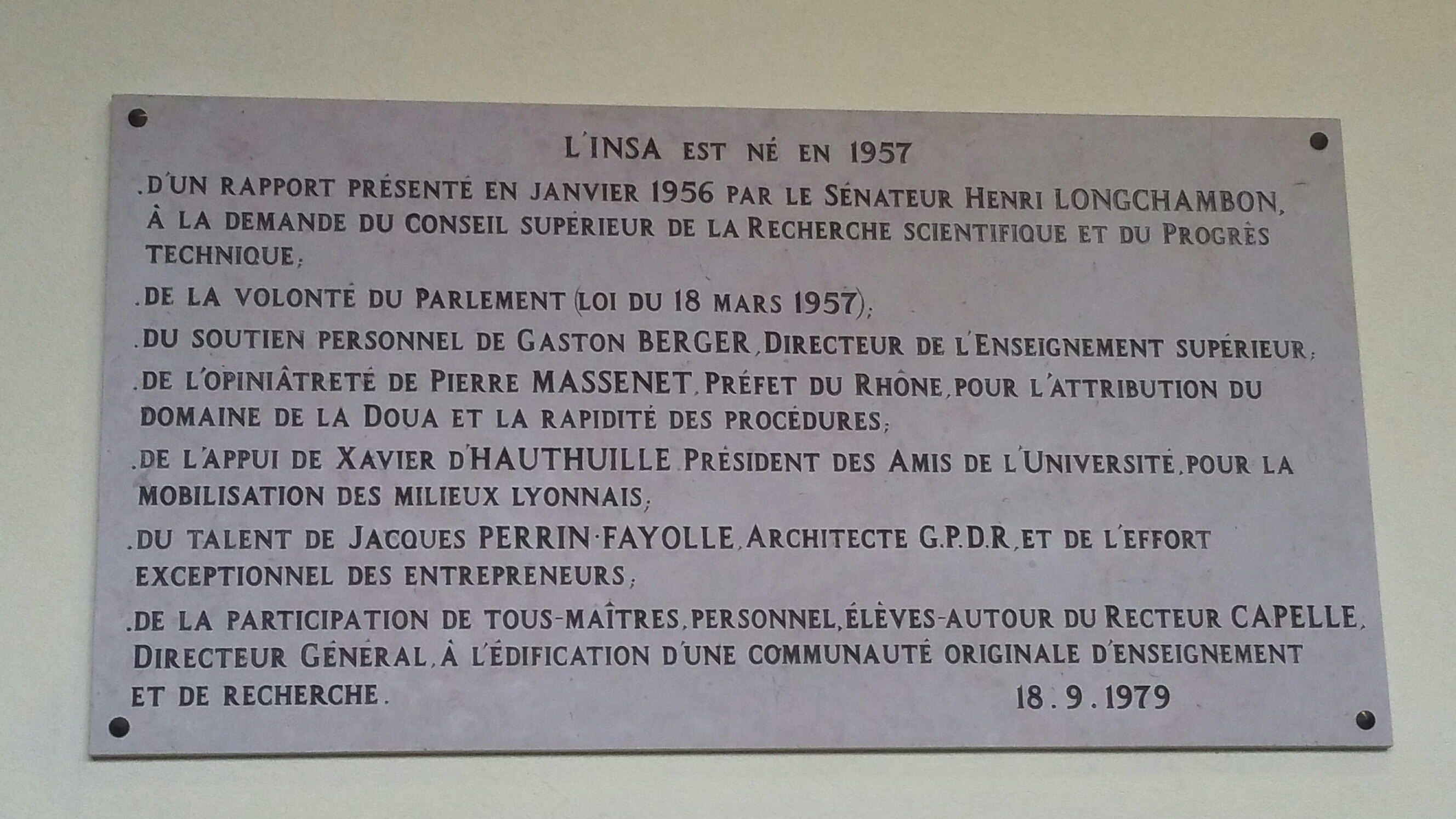 commémorative de la création de l'INSA de Lyon, 1979